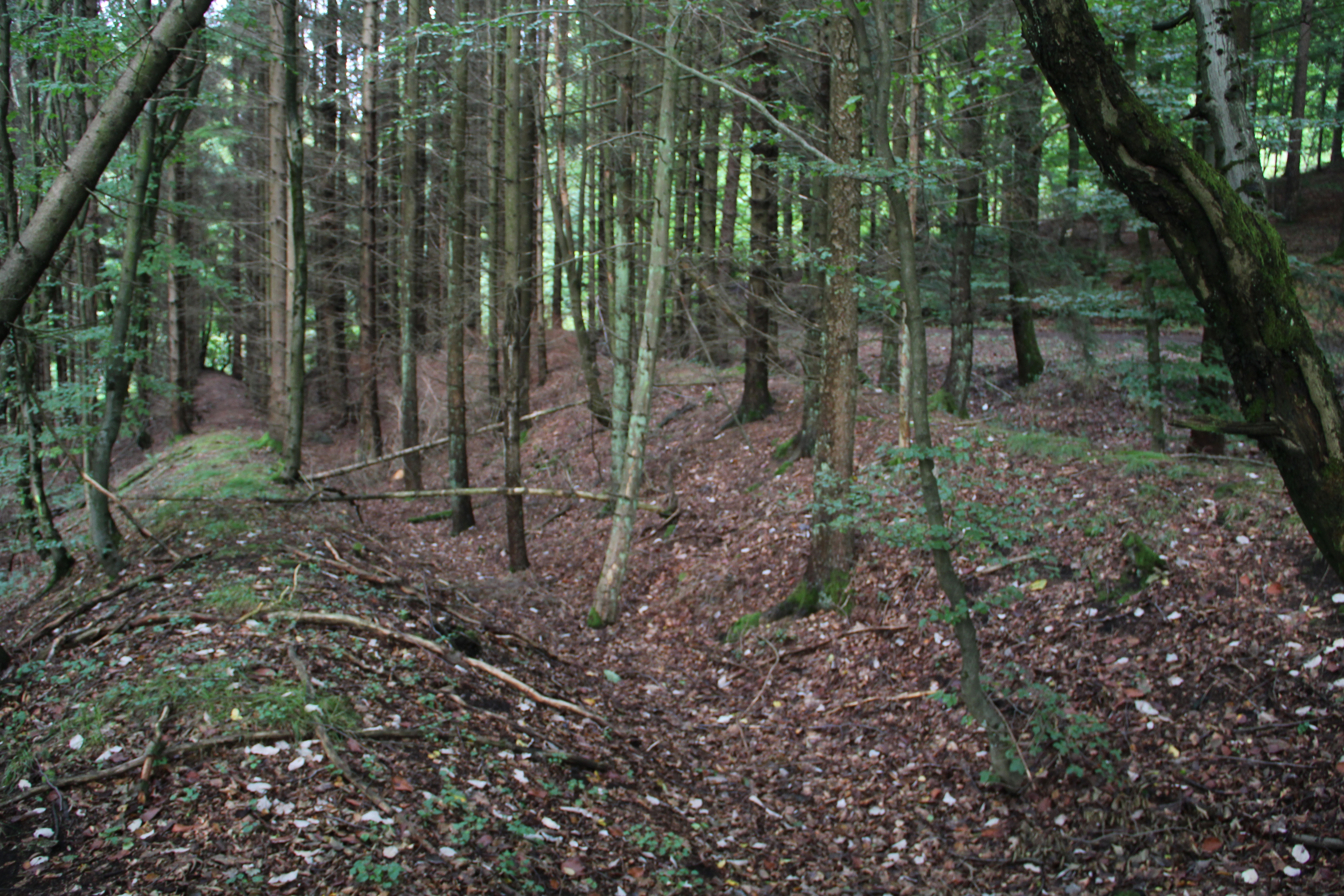 Landheege oberhalb Rachelshausen